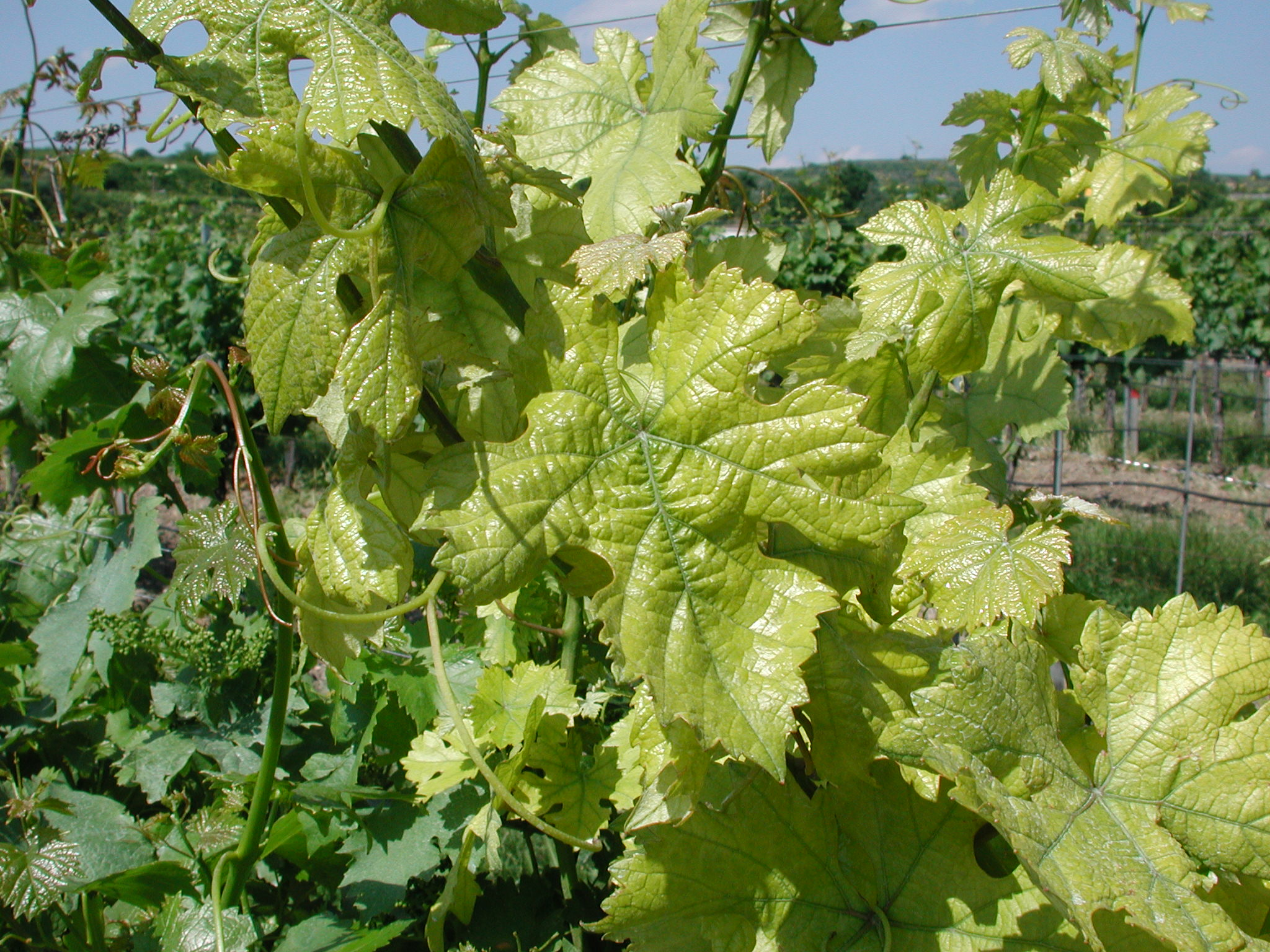 Chlorose - Rebe